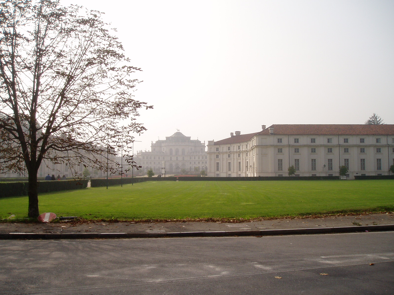 Paleis van Stupinigi. Eigen foto van 16 oktober 2005.